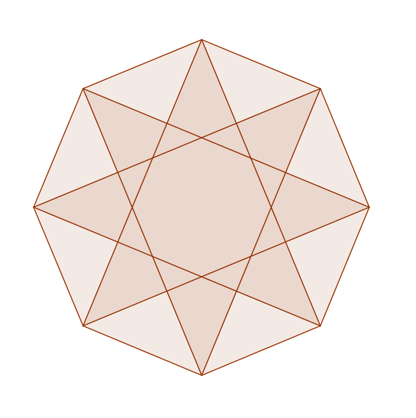 файл создан в среде GeoGebra